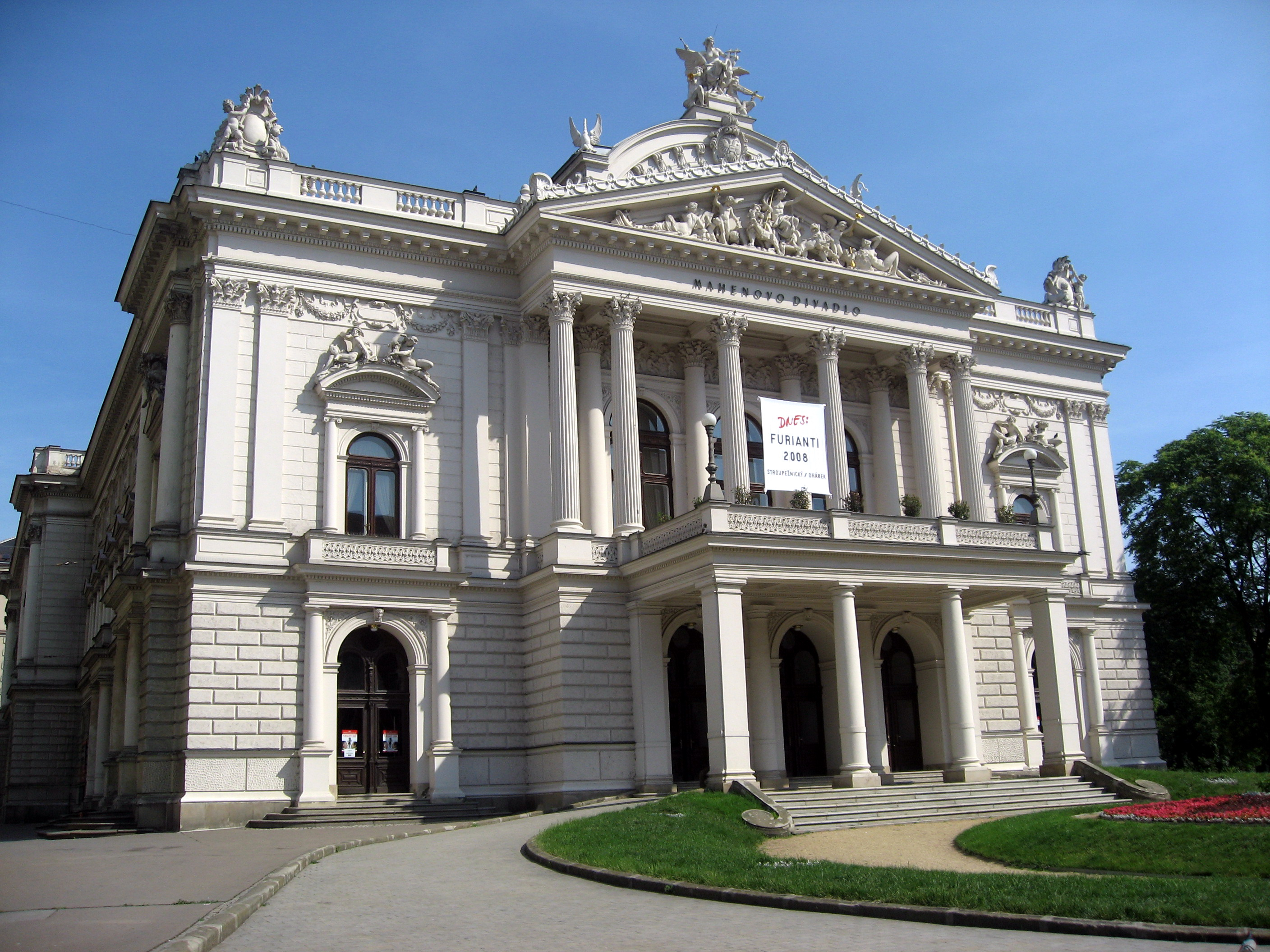 Mahenovo divadlo